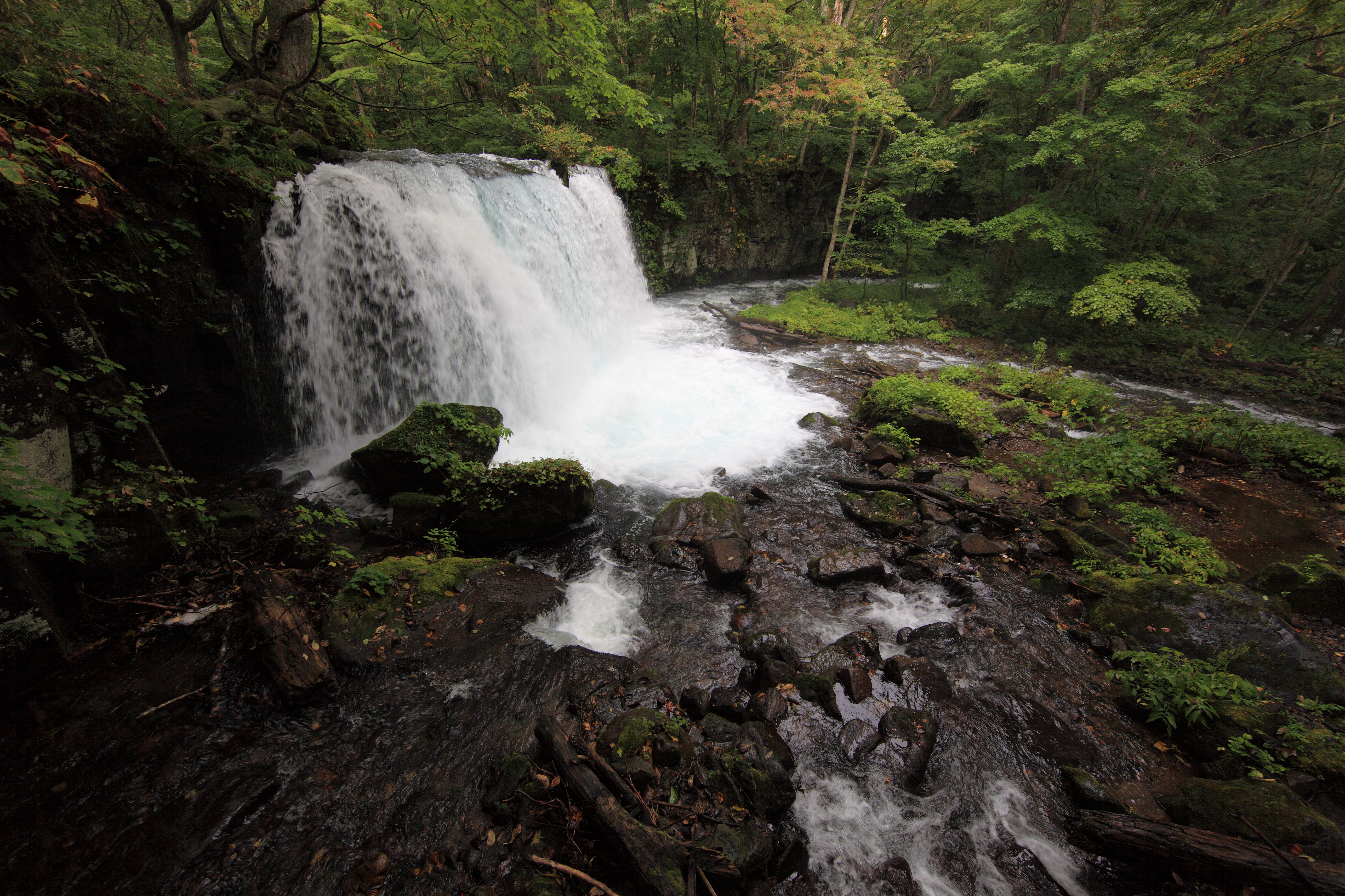 Oirase Stream, Towada-shi(city) Aomori-ken(Prefecture), Japan 青森県十和田市(あおもりけんとわだし) 奥入瀬渓流(おいらせけいりゅう)